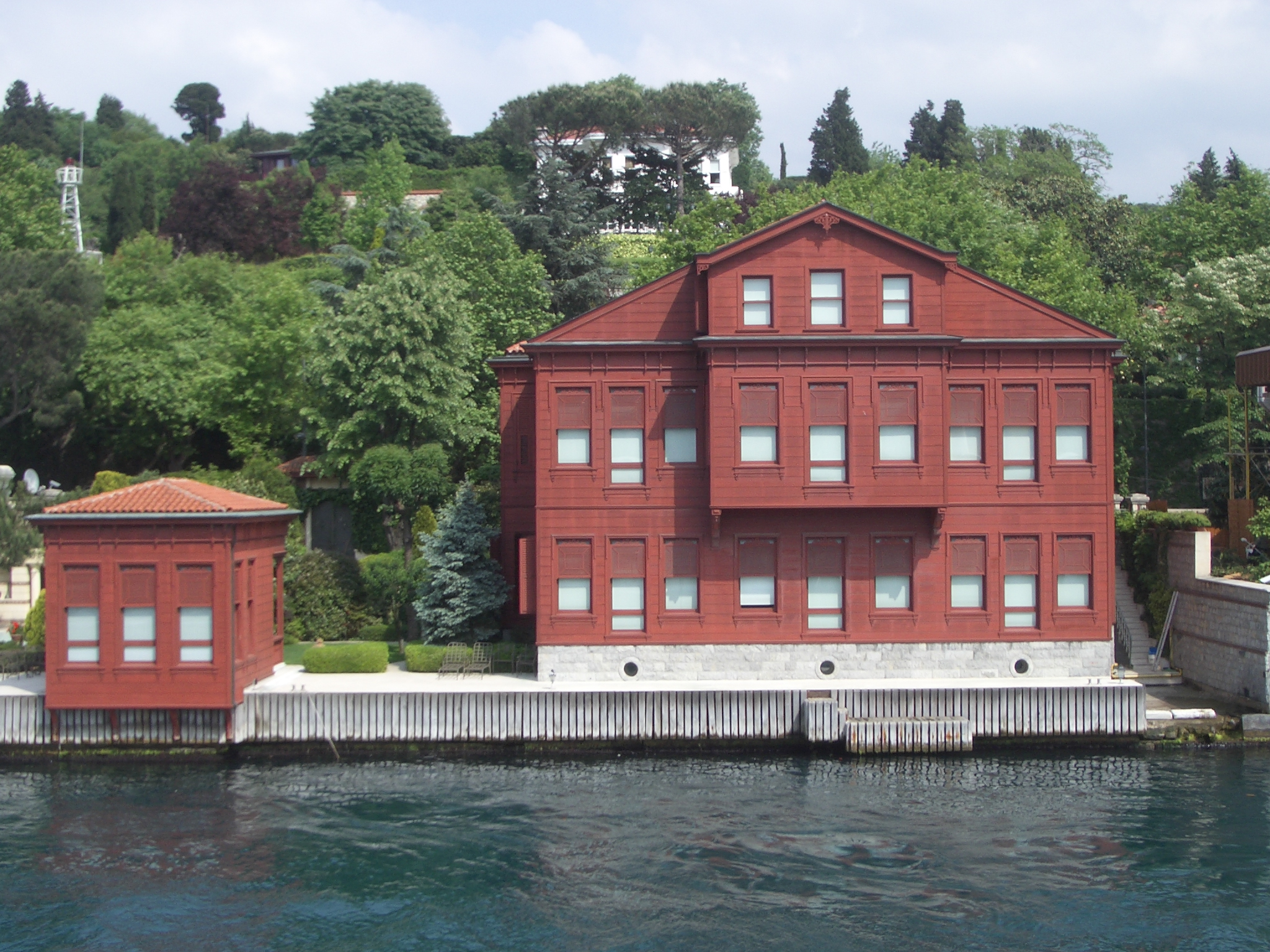 65, Bosforo-ko yali gehiago ferrytik